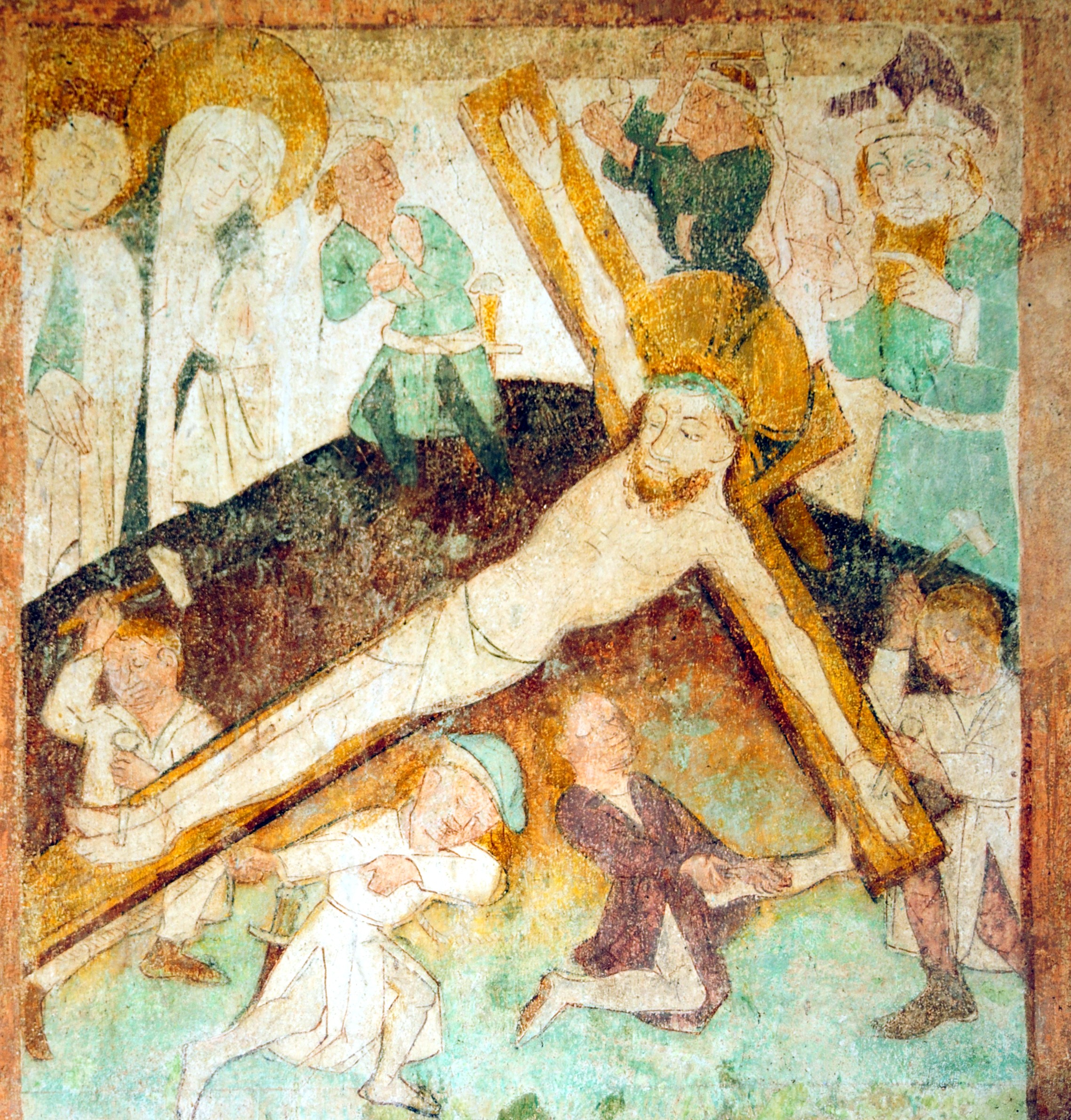 Peterskirche Blansingen: Bilderzyklus der Nordwand (Kreuzanheftung)